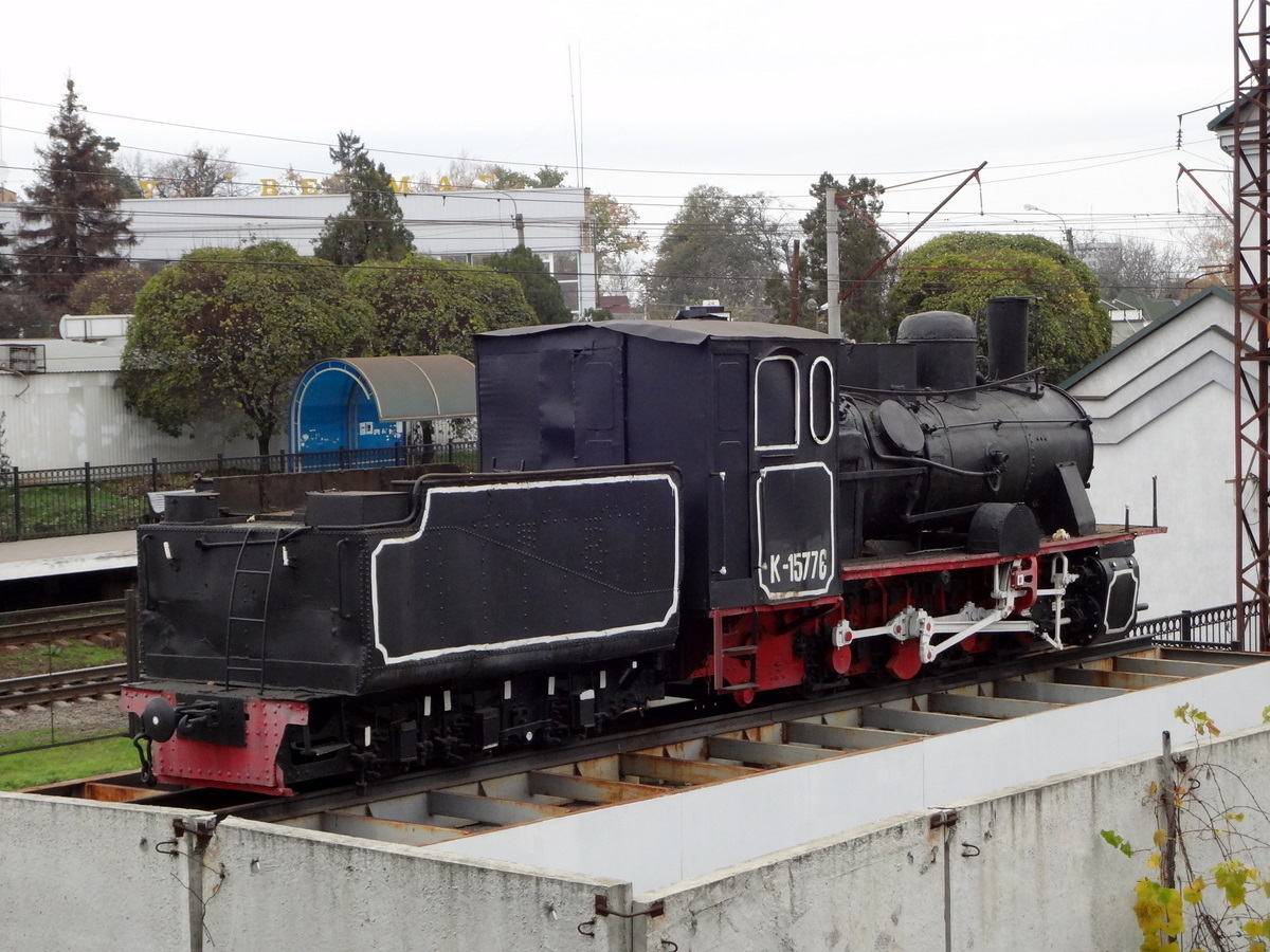 Паровоз на постаменте на перроне станции Боярка.